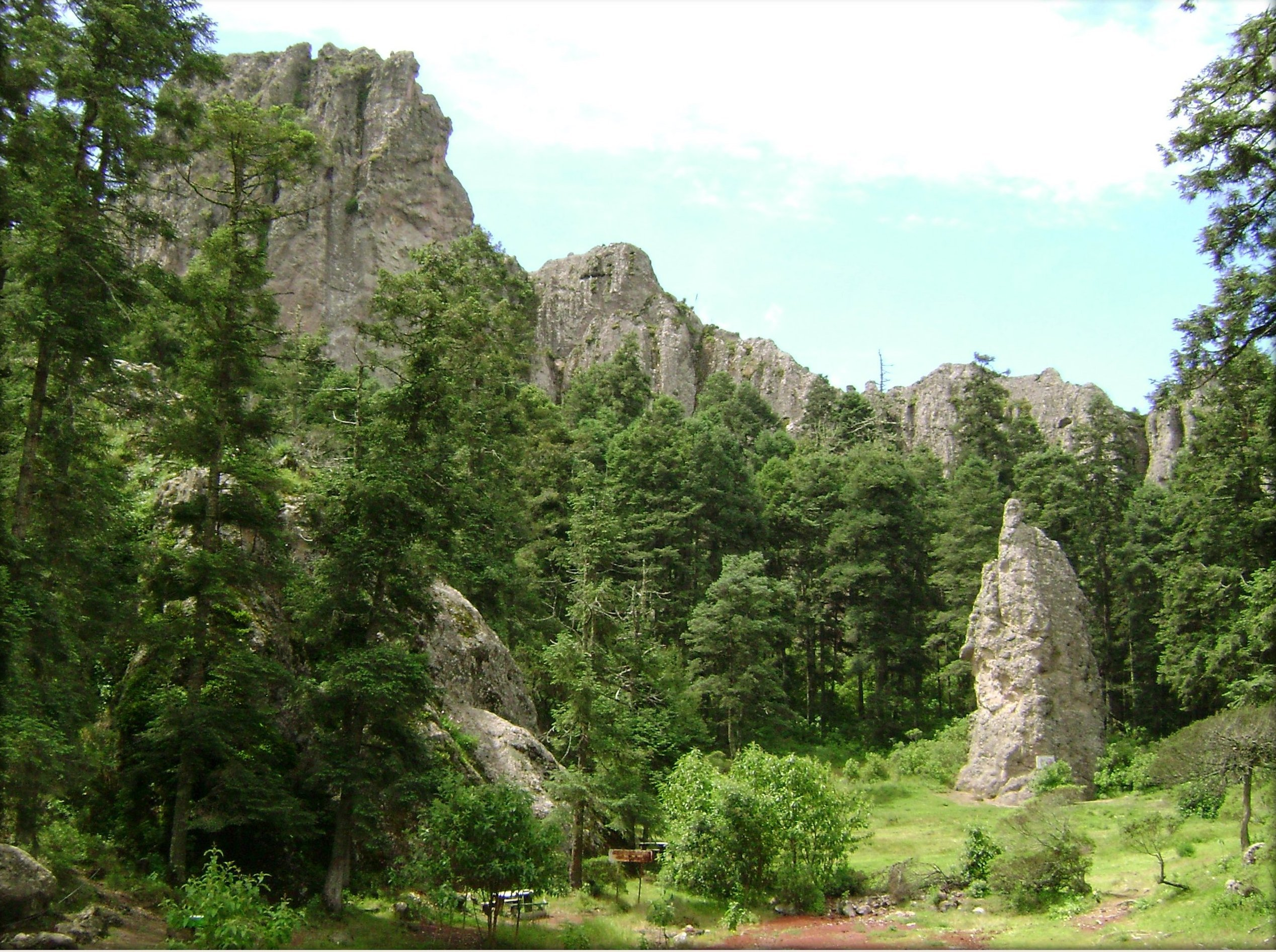 Parque Nacional El Chico, México.